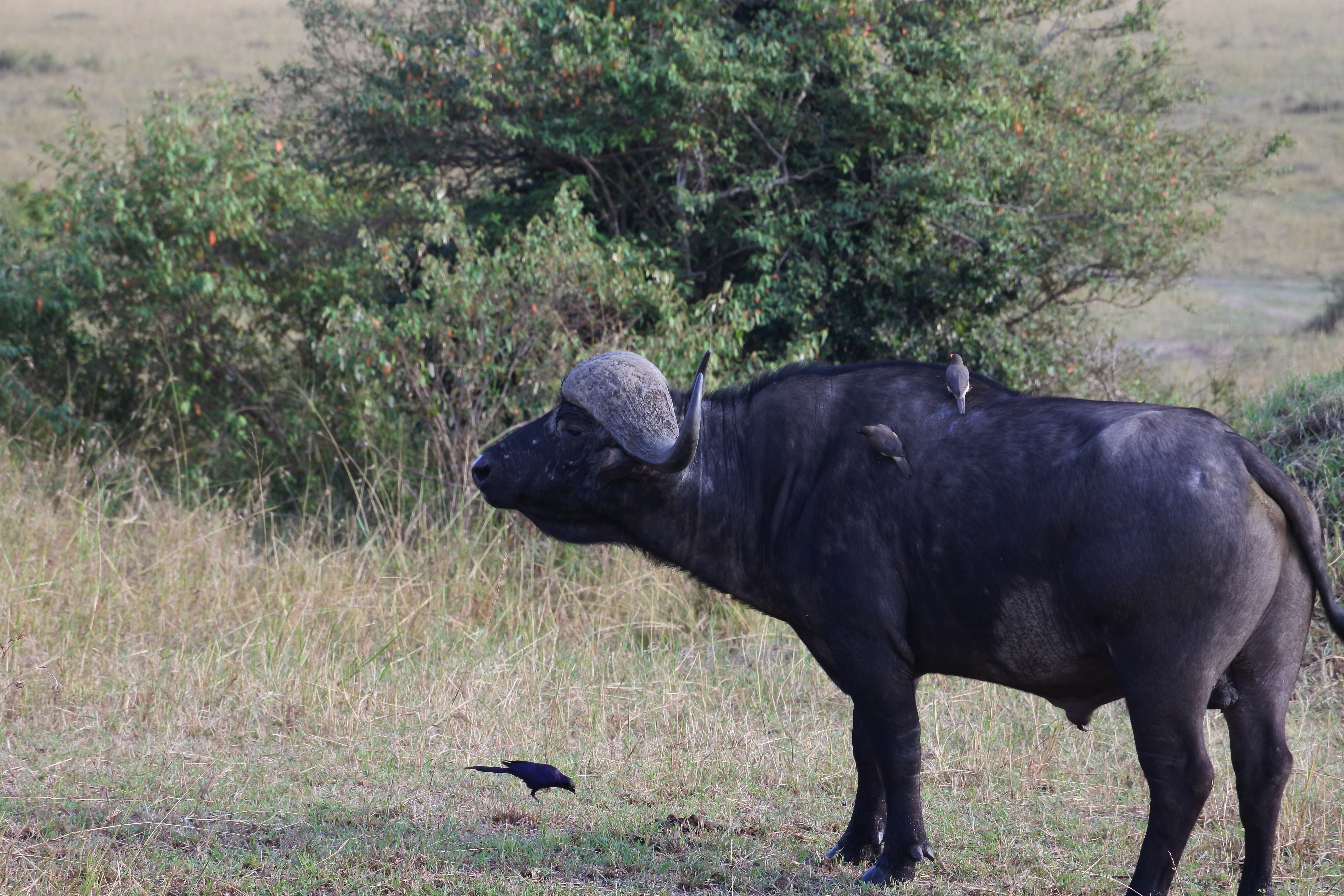 Syncerus caffer in Kenya